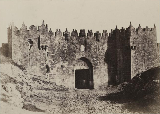 Porte de Damas, vur extérieure, Jerusalem.